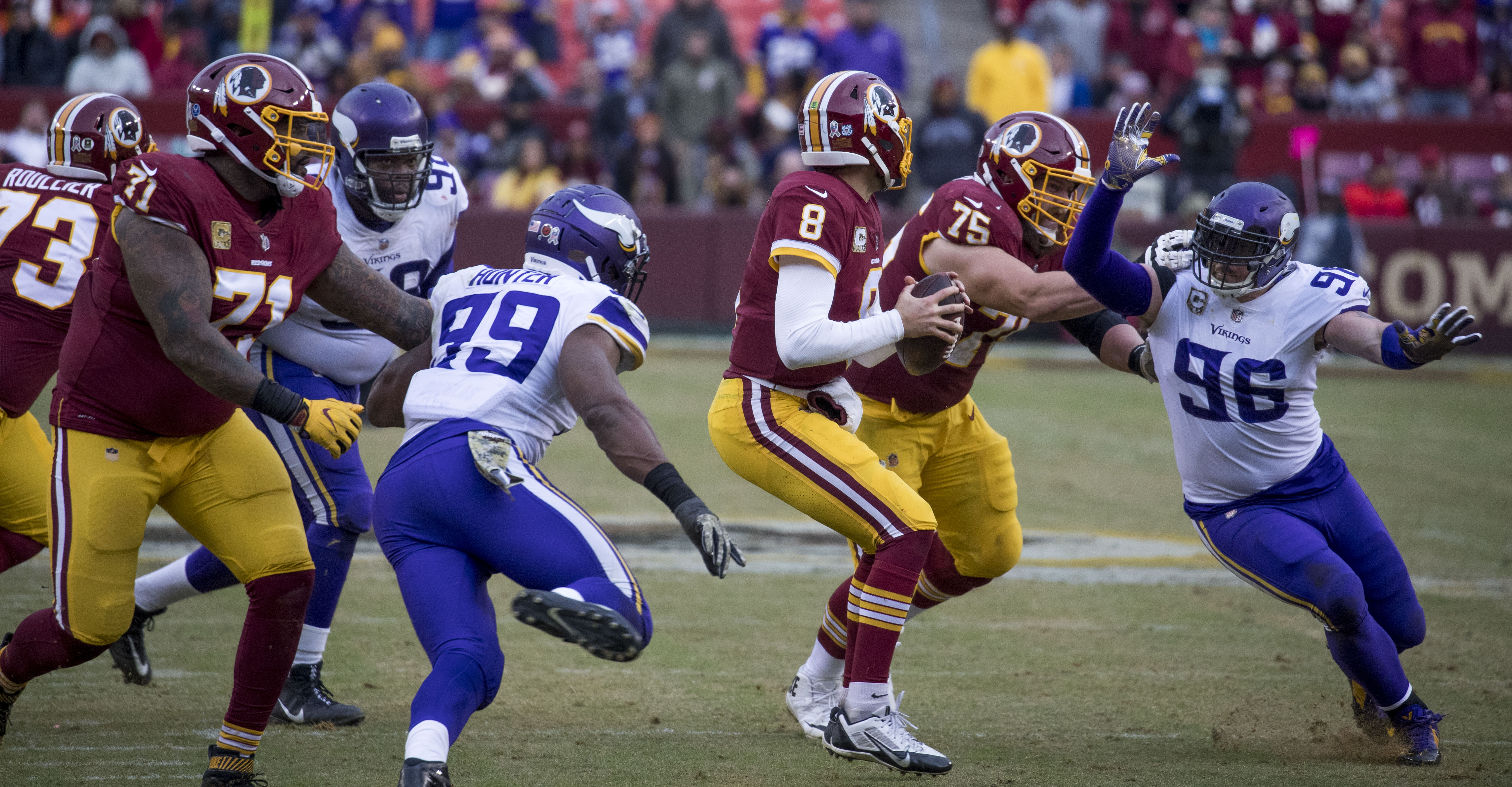 Vikings at Redskins 11/12/17